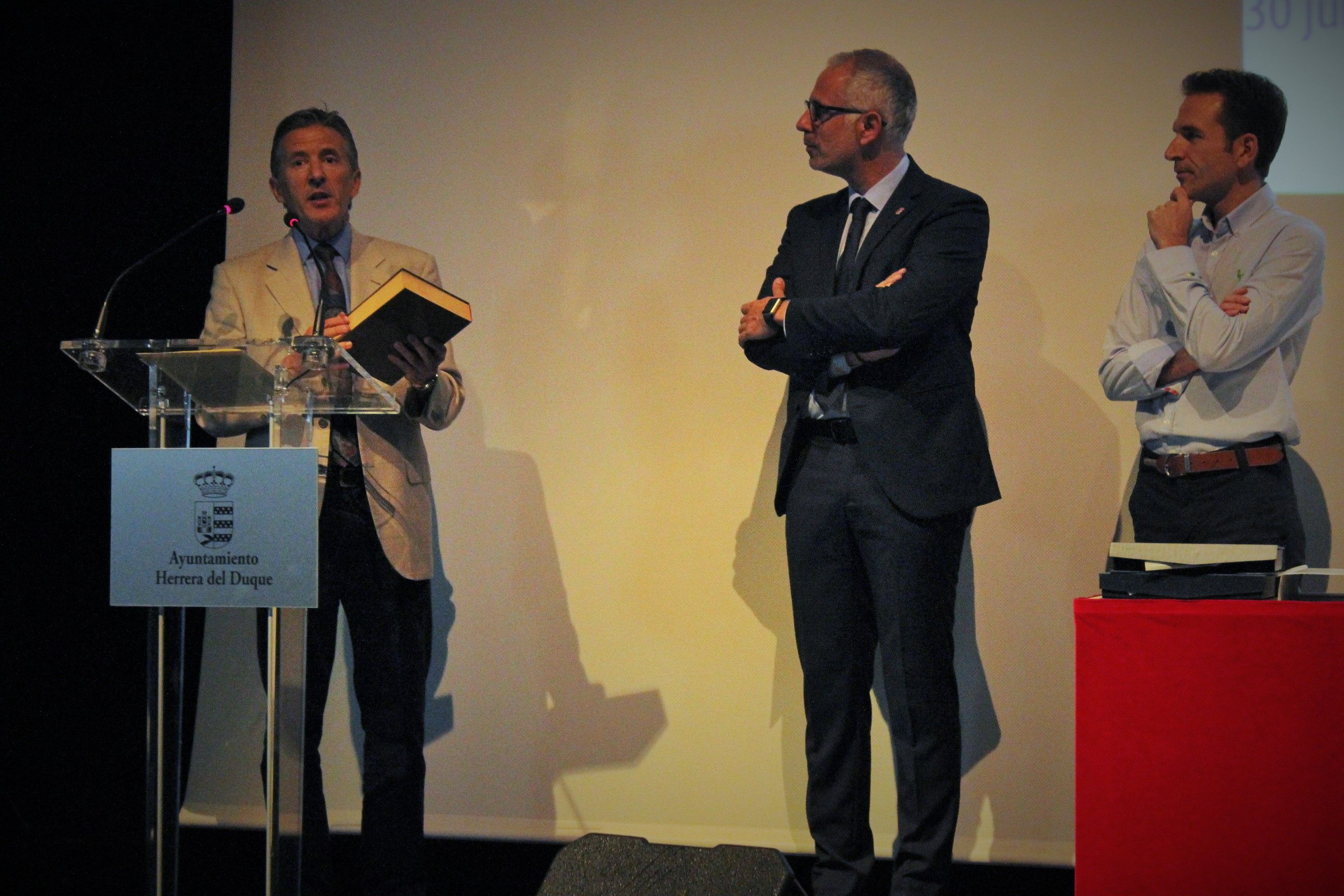 urbestro de Herrera